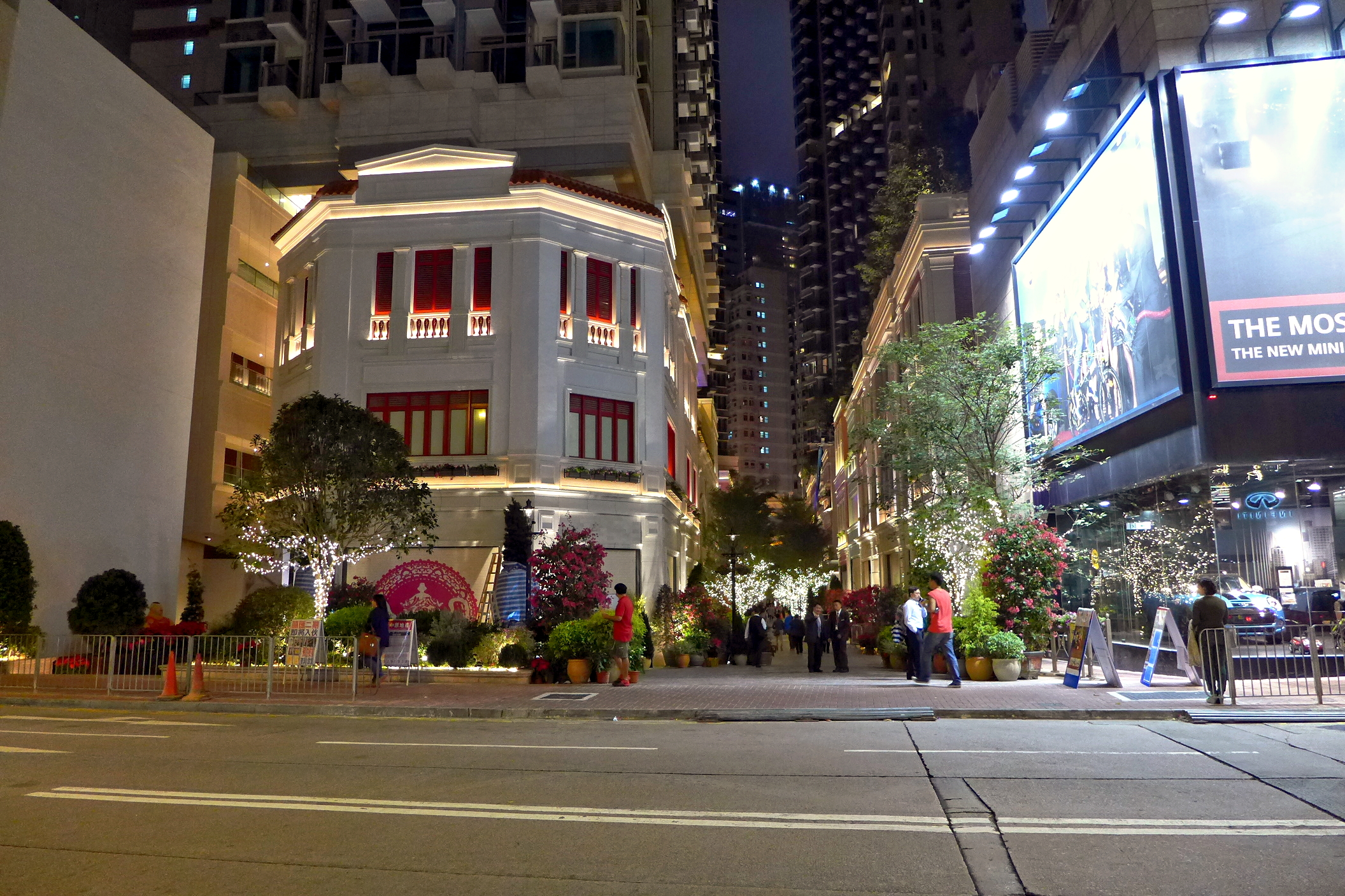 Lee Tung Avenue